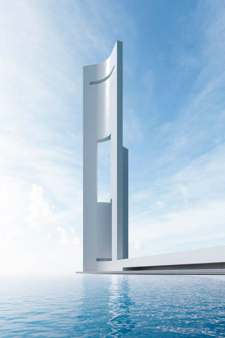 Eòlica